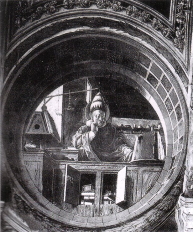 San Gregorio